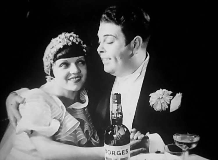 Fotografia Publicitária do Filme A Canção de Lisboa